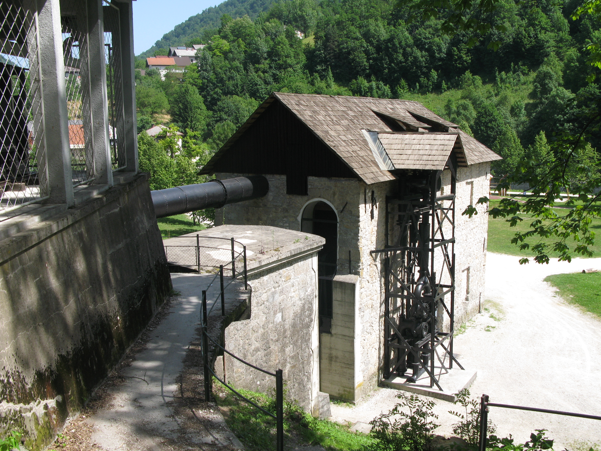 Kamšt v Idriji